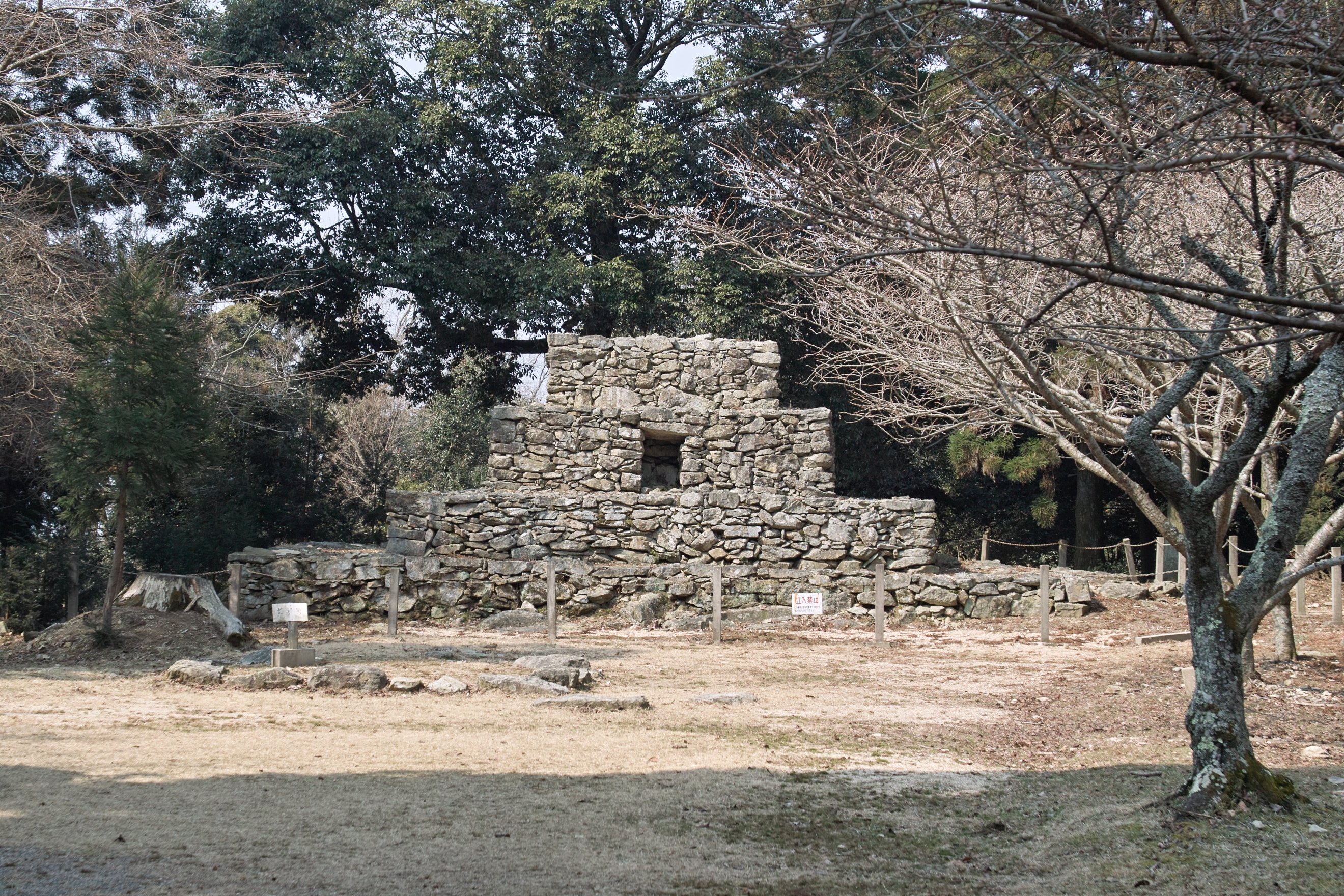 熊山遺跡２